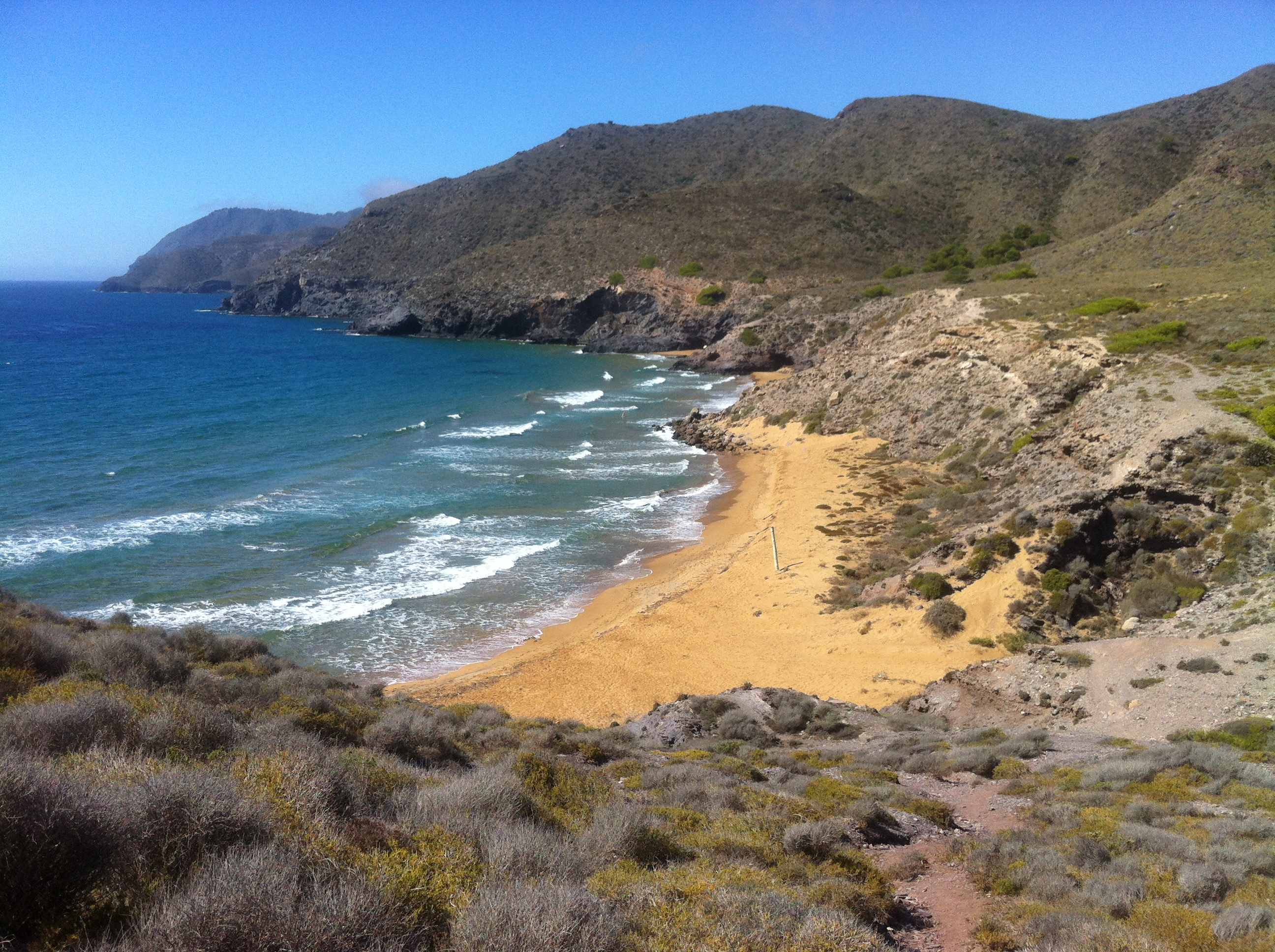 Vista elevada de la playa Parreño - Cartagena, España.